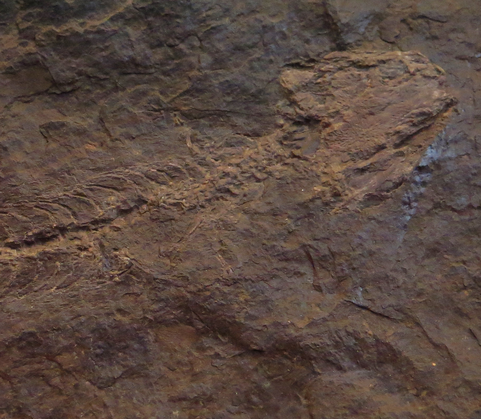 Scincosaurus fossil